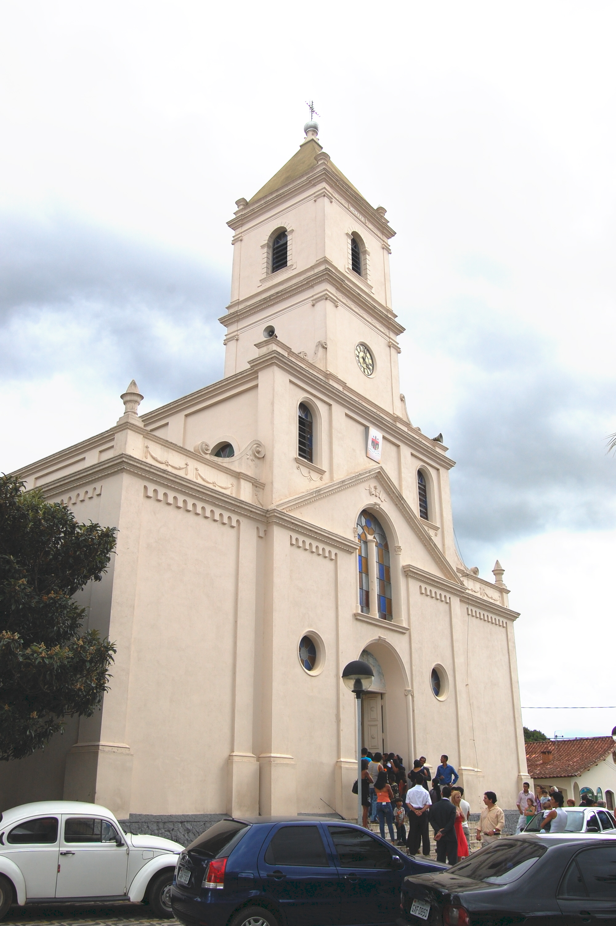 Igreja matriz de Santa Rita de Cássia em Extrema, Minas Gerais, Brasil.